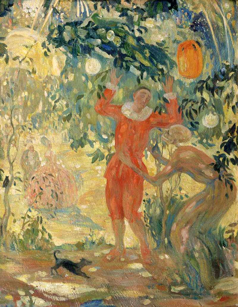 "Пьеро и смерть"Холст, масло. 61 x 47 см Краснодарский краевой художественный музей им. Ф.А.Коваленко